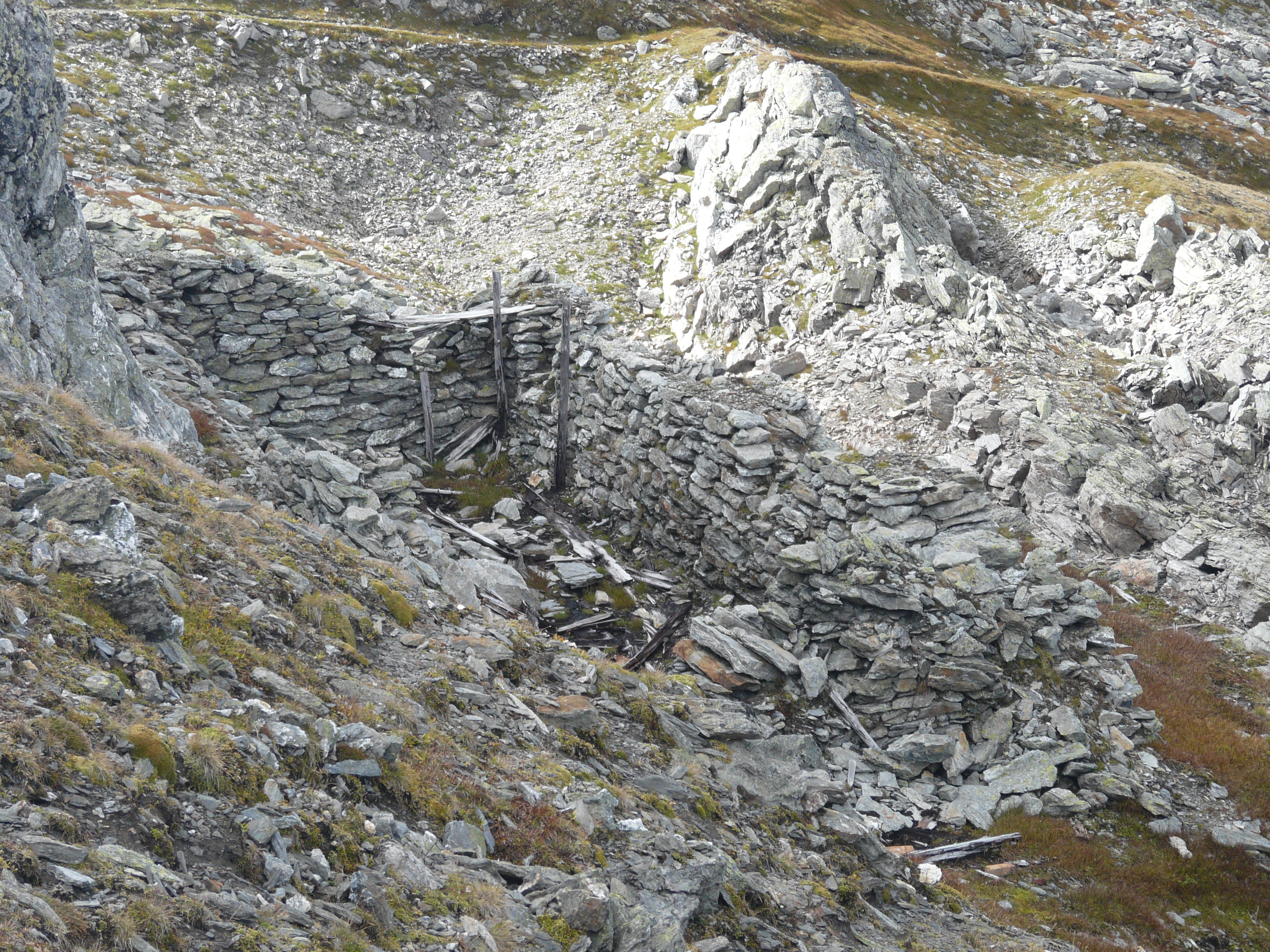 Verfallener Stellungsbau des Ersten Weltkriegs auf der Kammlinie der Karnischen Alpen, westlich der Obstanserseehütte am Karnischen Höhenweg.